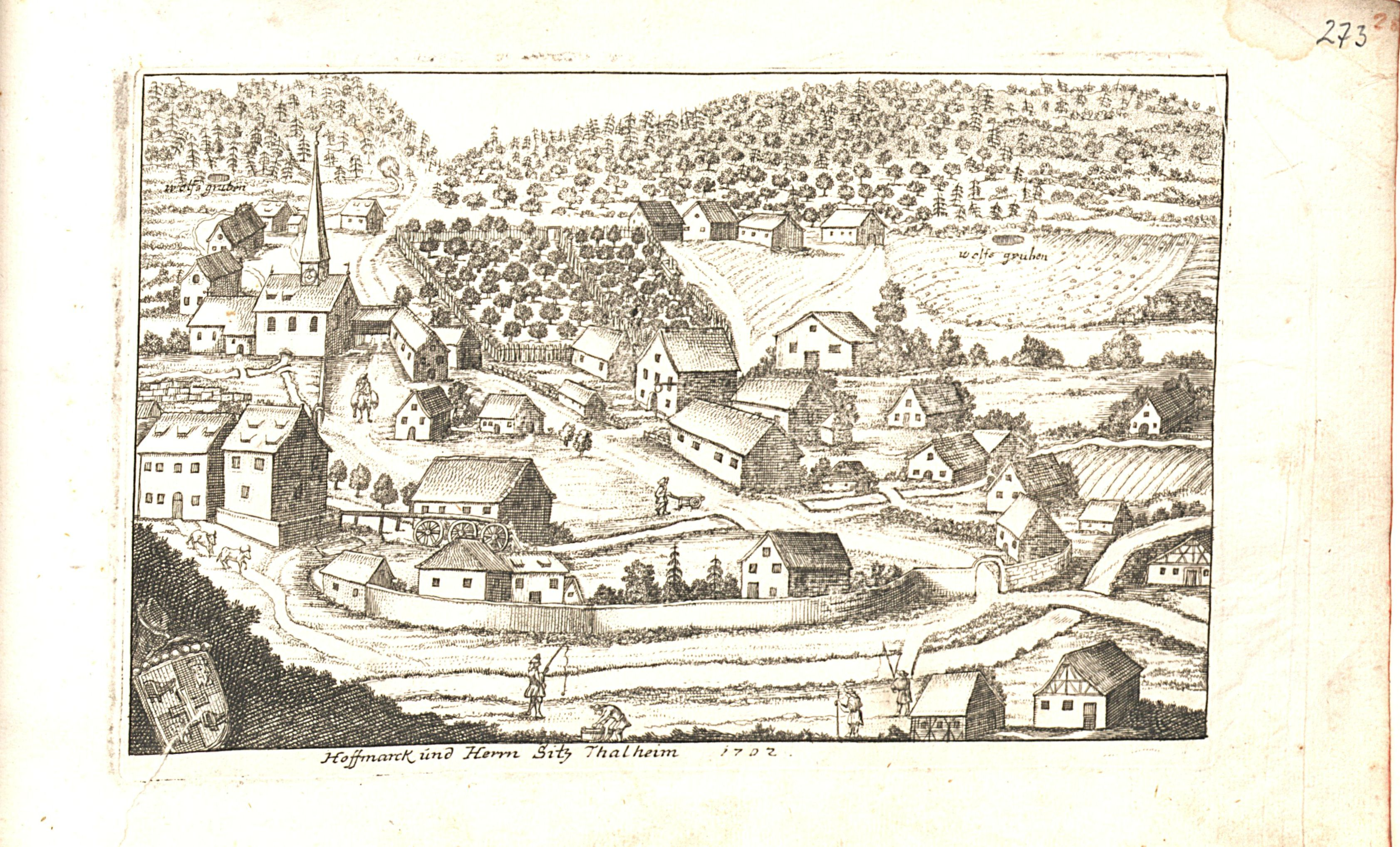 Stich aus "Des Heil. Röm. Reichs Stadt Nürnberg Zierdte" von Johann Alexander Böner. Exemplar mit der Signatur: Eichstätt-Ingolstadt, Universitätsbibliothek -- 04/1 WG 300